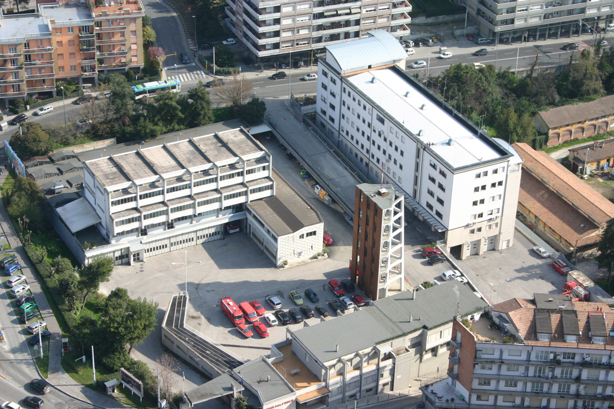 Ancona, sede del comando provinciale dei Vigili del Fuoco